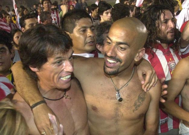 José Luis Calderón y Juan Sebastián Verón, campeones del Torneo Apertura 2006 con Estudiantes, festejando la conquista del título en el Estadio Ciudad de La Plata.